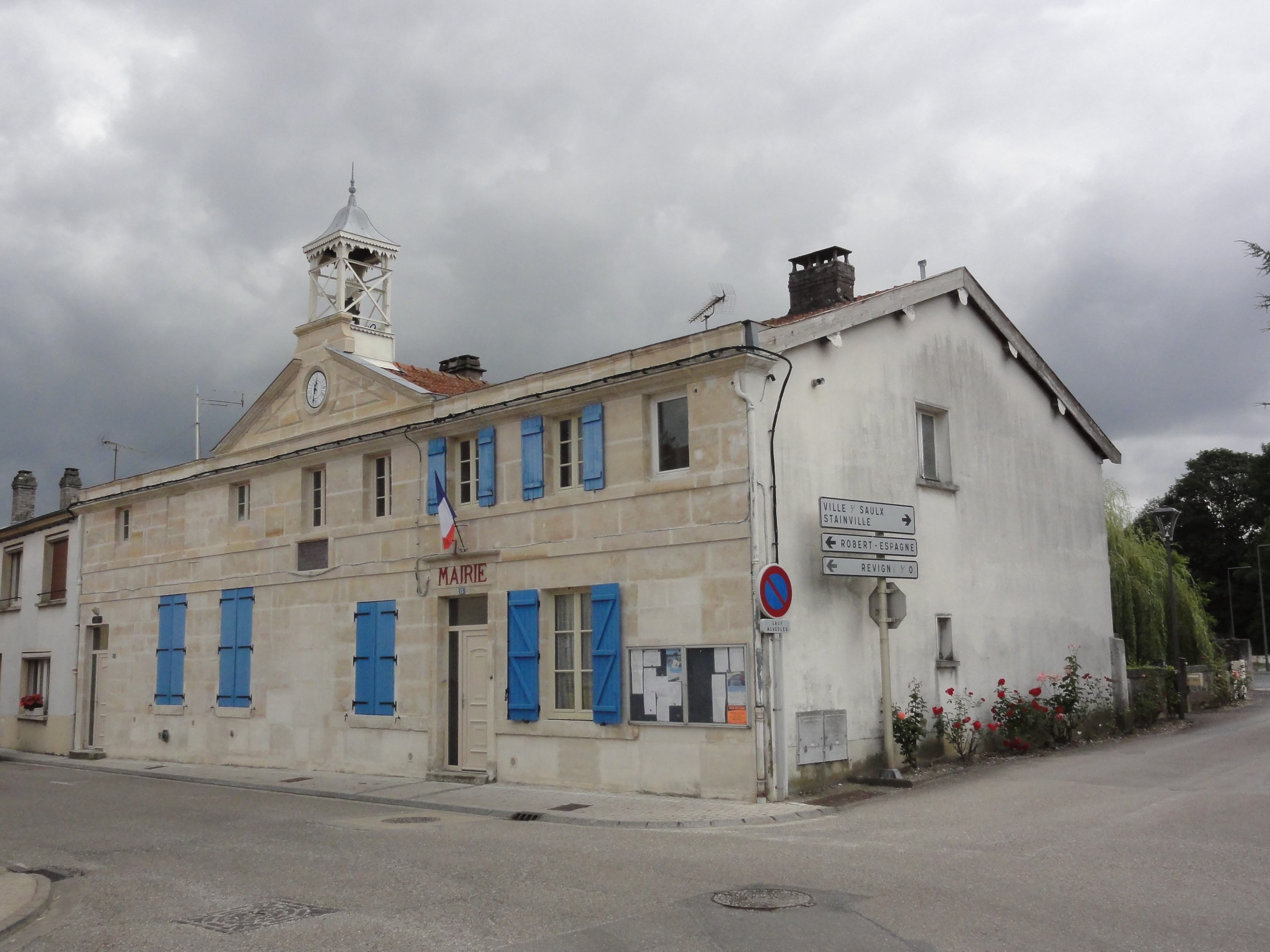 Lisle-en-Rigault (Meuse) mairie